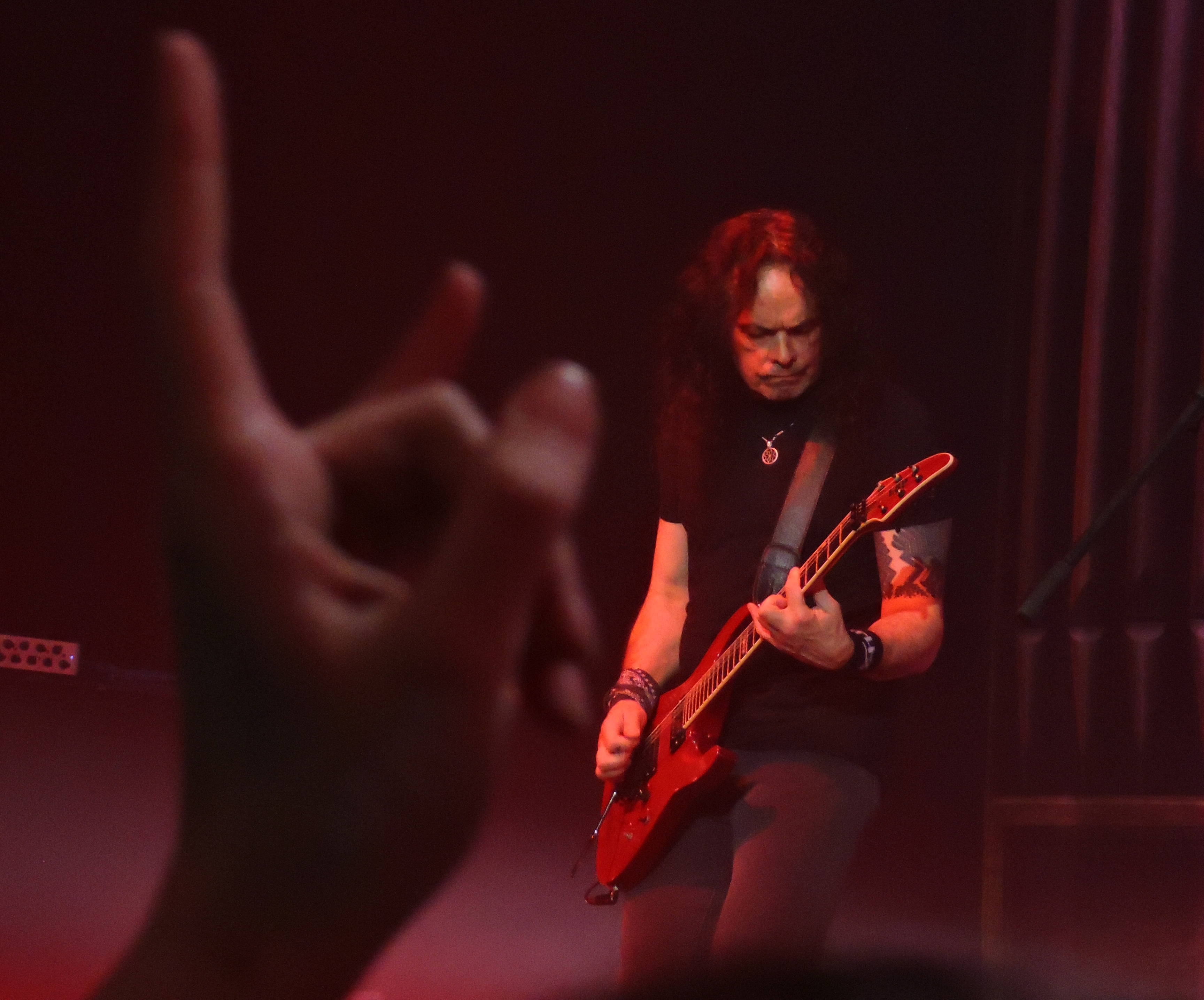 Гитарист группы "Ария" Сергей Попов и один из зрителей, показывающий козу